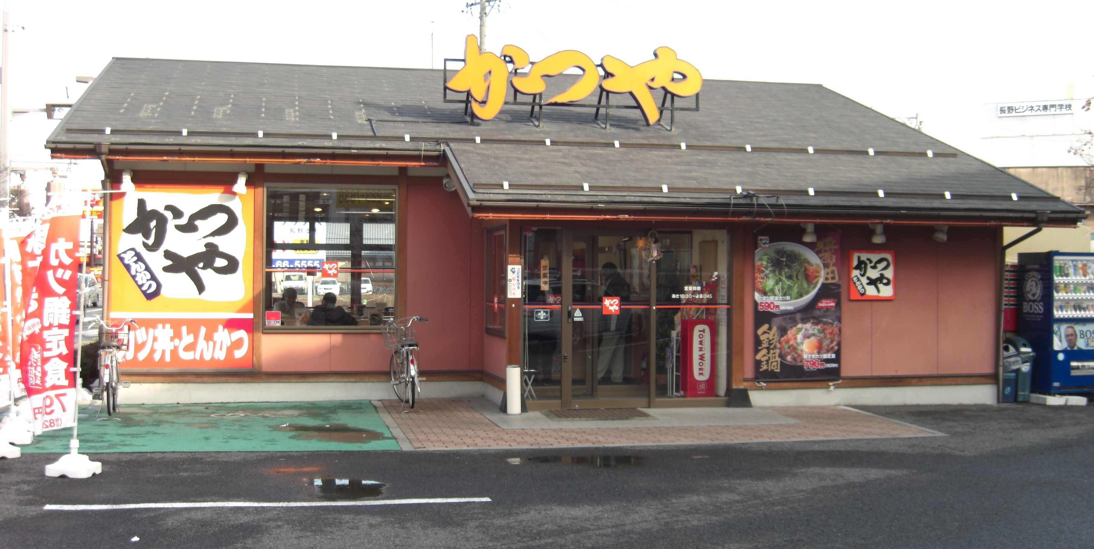 かつや（長野七瀬店）